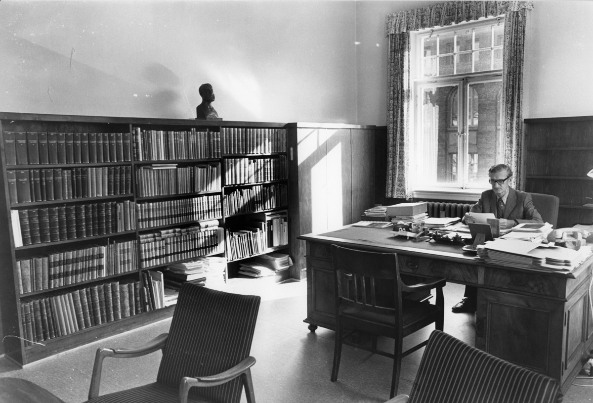 Beskrivelse: Riksarkivar Dagfinn Mannsåker på sitt kontor i bygningens søndre hjørne, 1970-årene. Hans Hansens byste av Henrik Wergeland fra 1845 på bokhyllen. Henrik Wergeland ble i 1841 Norges første riksarkivar. Fotograf: Solly Sannerud, Riksarkivet Arkivreferanse: S1577Ub9_10_8